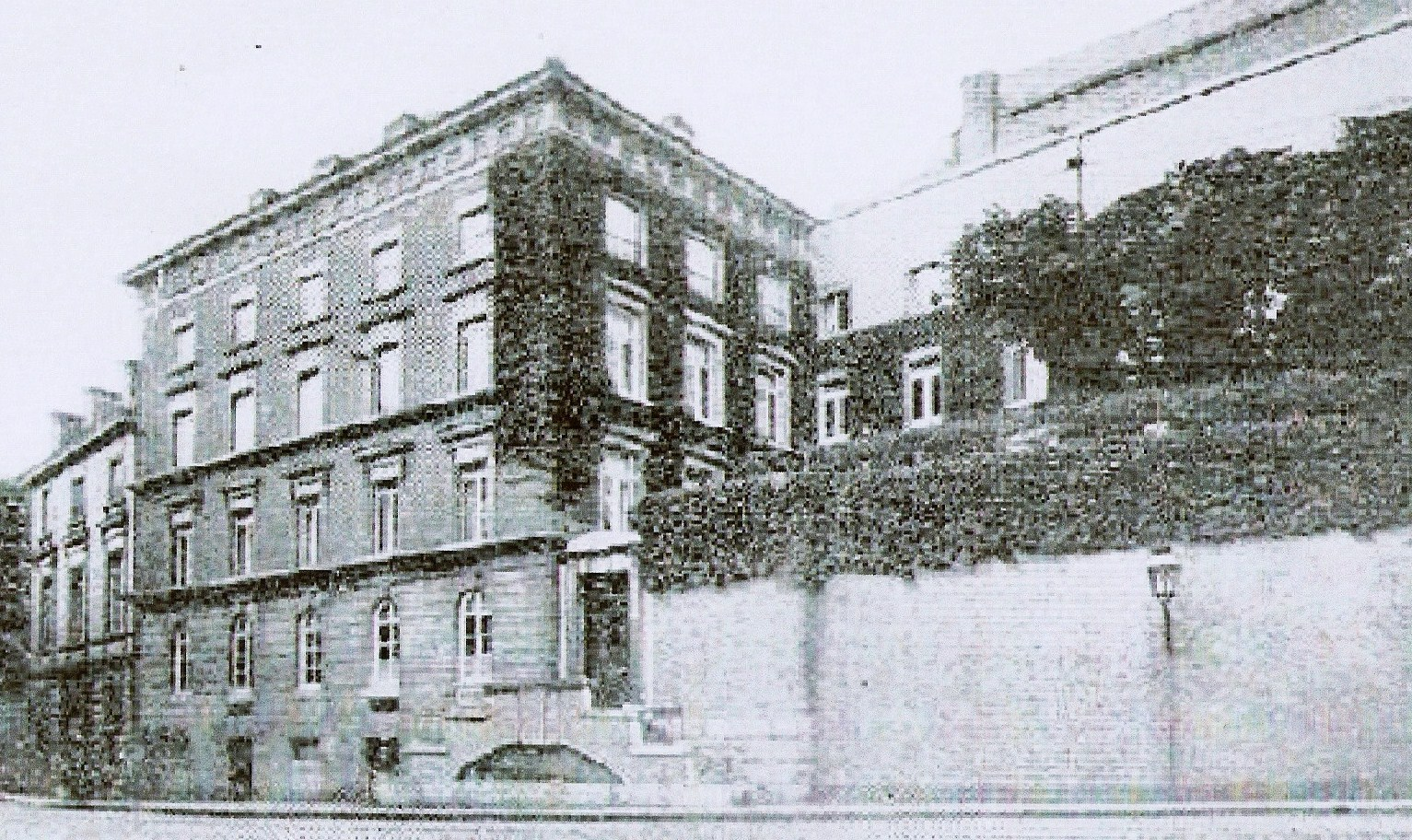 Privathaus von Oskar Erckens, Dammstraße 5, Aachen-Burtscheid